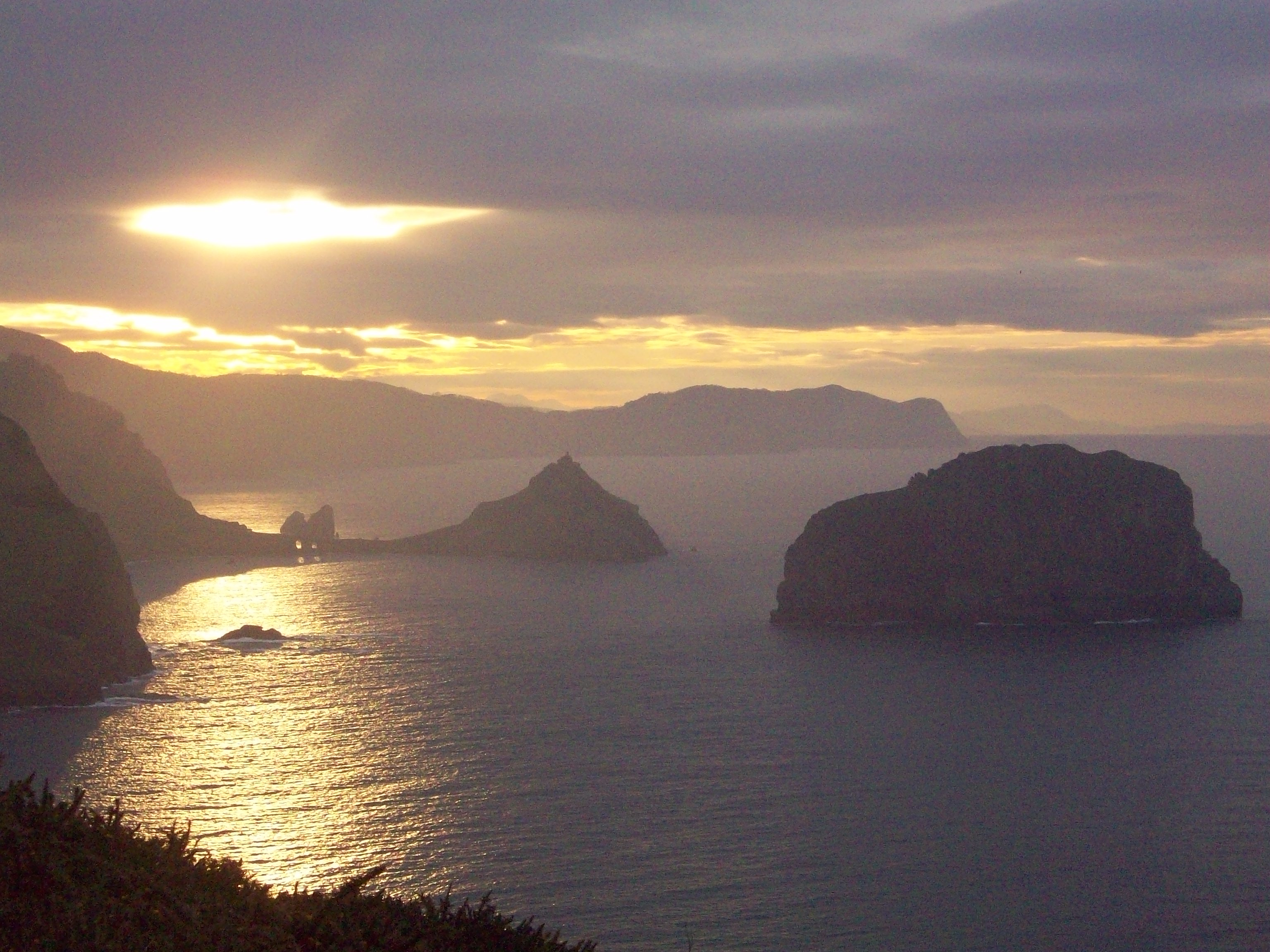 Gaztelugatxe iluntzealdean. Bizkaia, Euskal Herria. Gaztelugatxe in the evening. Biscay, Basque Country.